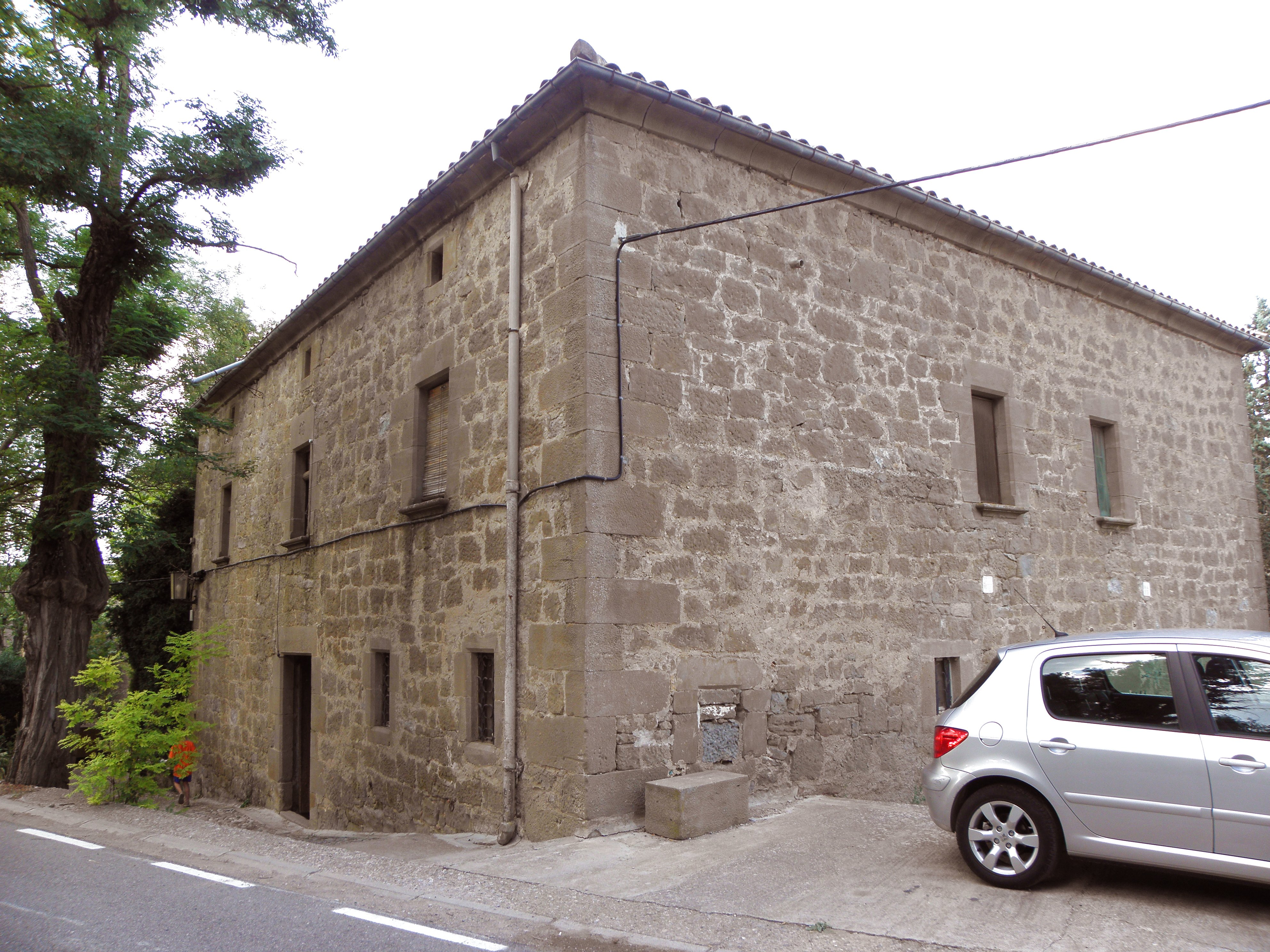 L'edifici de les antigues cel·les de Sant Antoni, al Santuari del Miracle (Riner, Solsonès) vist des del sud-est